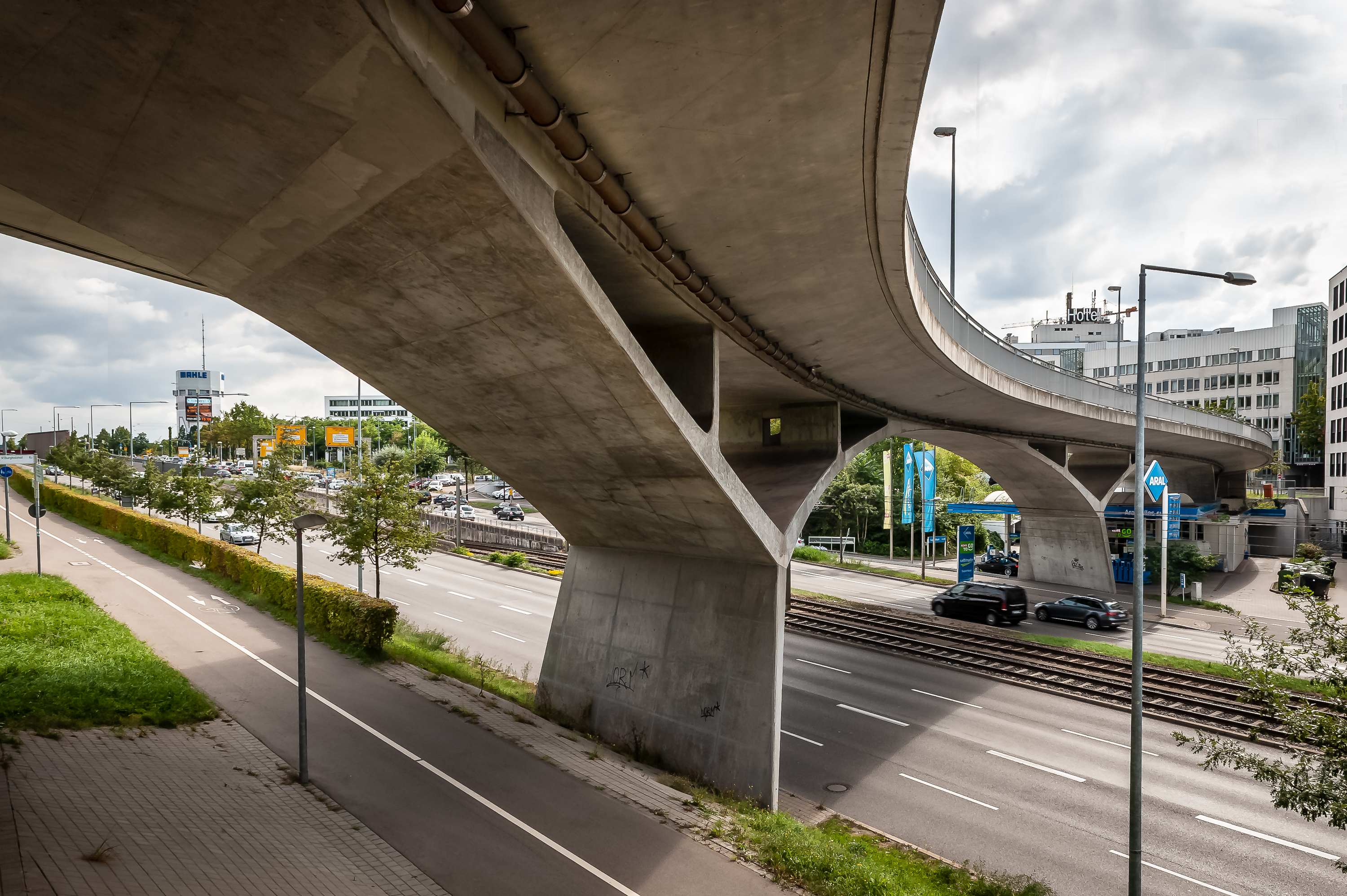 Auerbachbrücke über die Heilbronner Straße, Stuttgart, ausgeführt von Schlaich Bergermann Partner